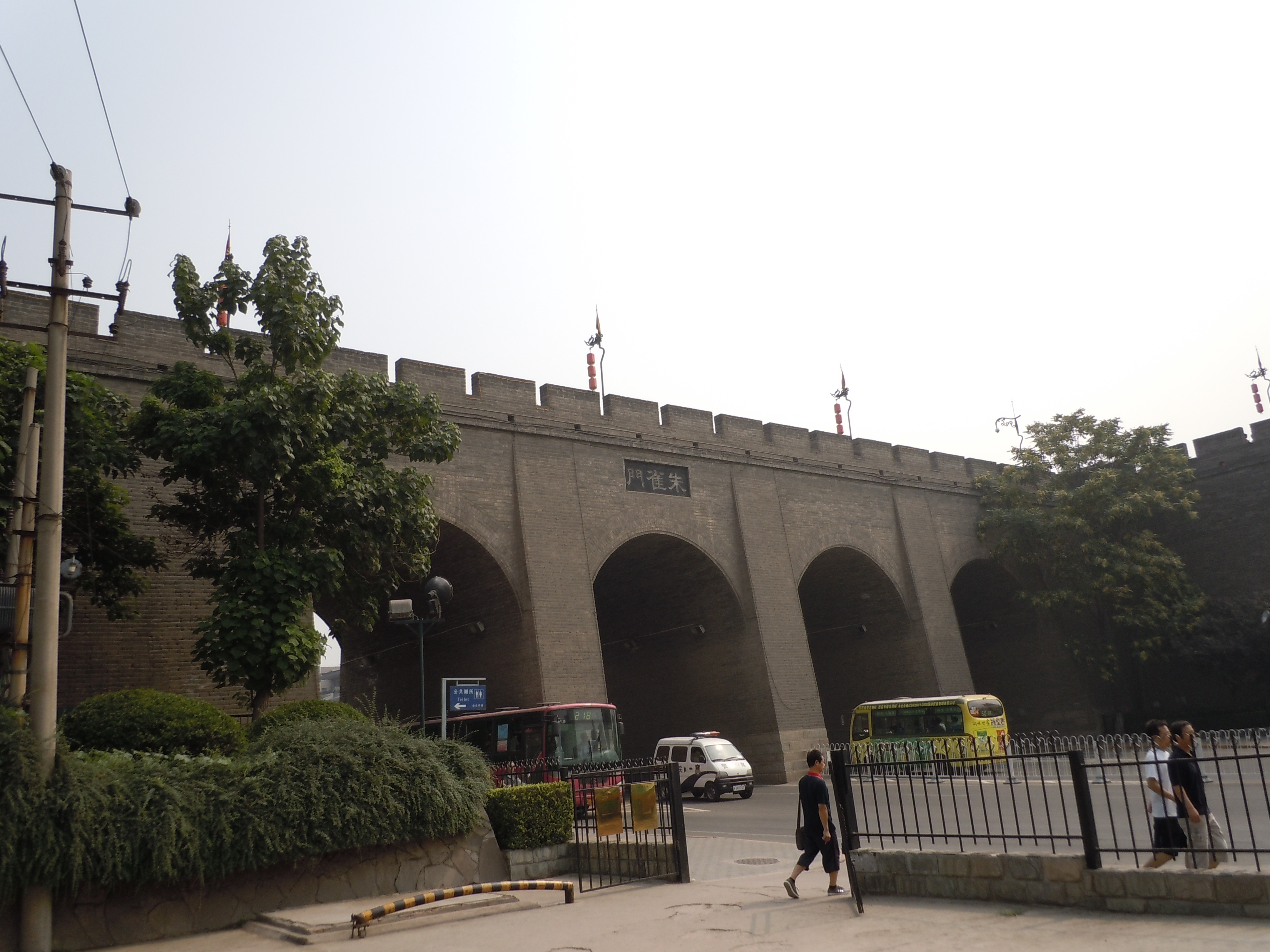 中文（中国大陆）: 西安城墙朱雀门